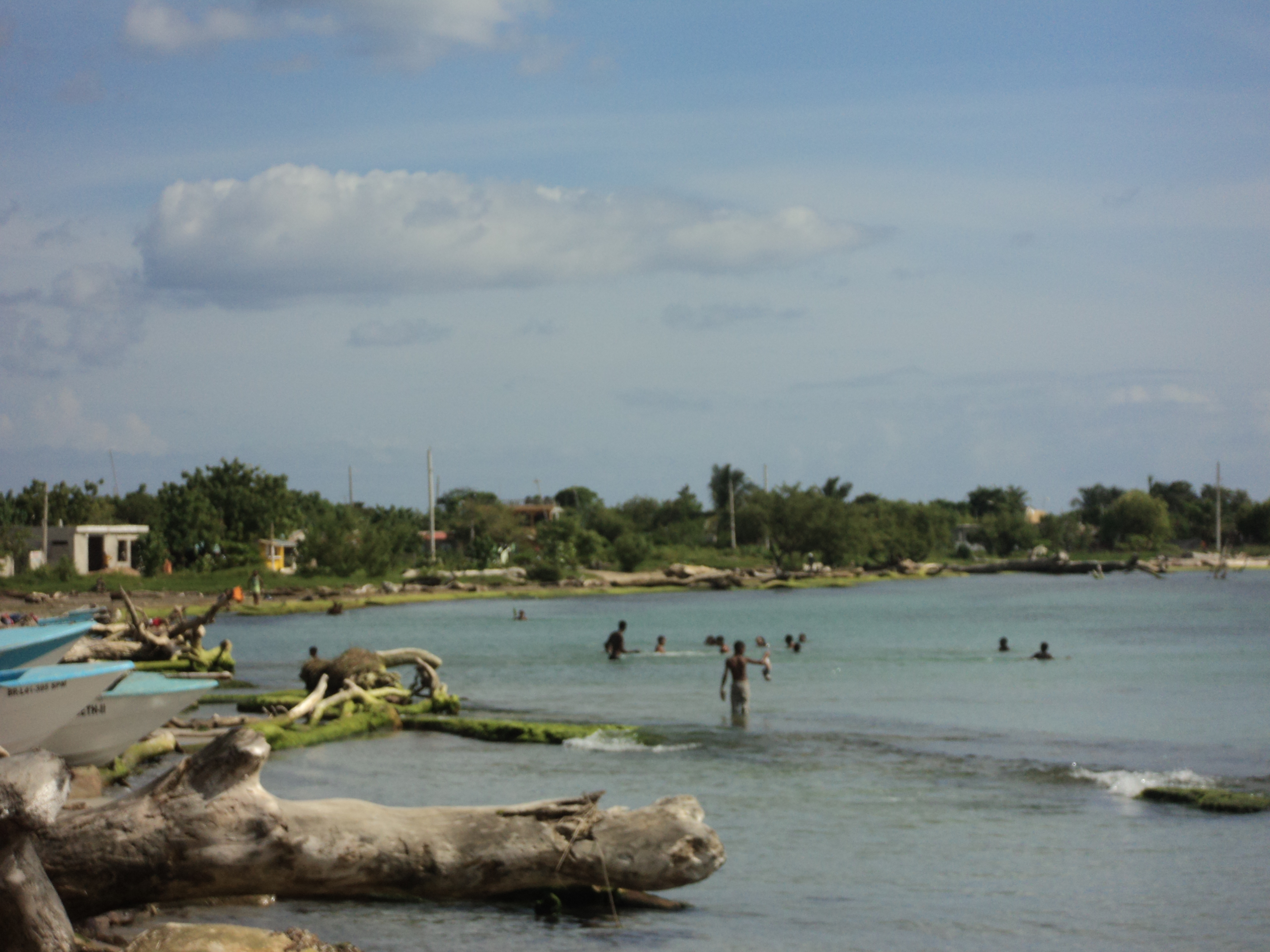 barrio la piedra, san pedro de macorís, republica dominicana